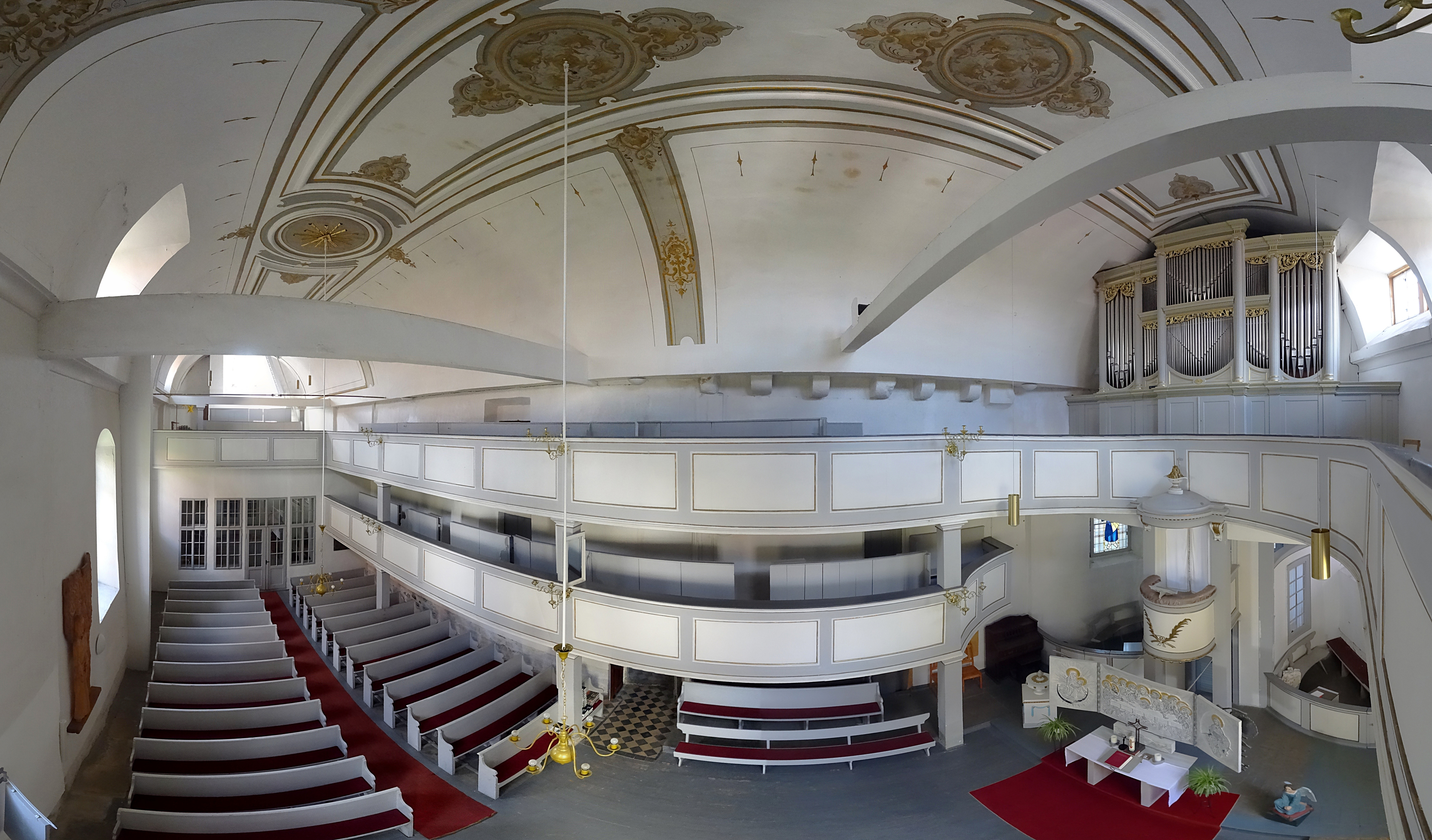 Innenraum Panorama der Kirche Sankt Walpurgis in Apfelstädt (Thüringen)